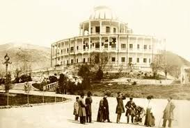 عکسی مربوط به کاخ فرح آباد واقع در دوشان تپه در دوره قاجار